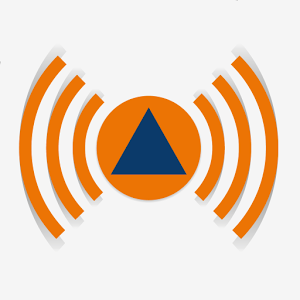 Logo der NINA APP